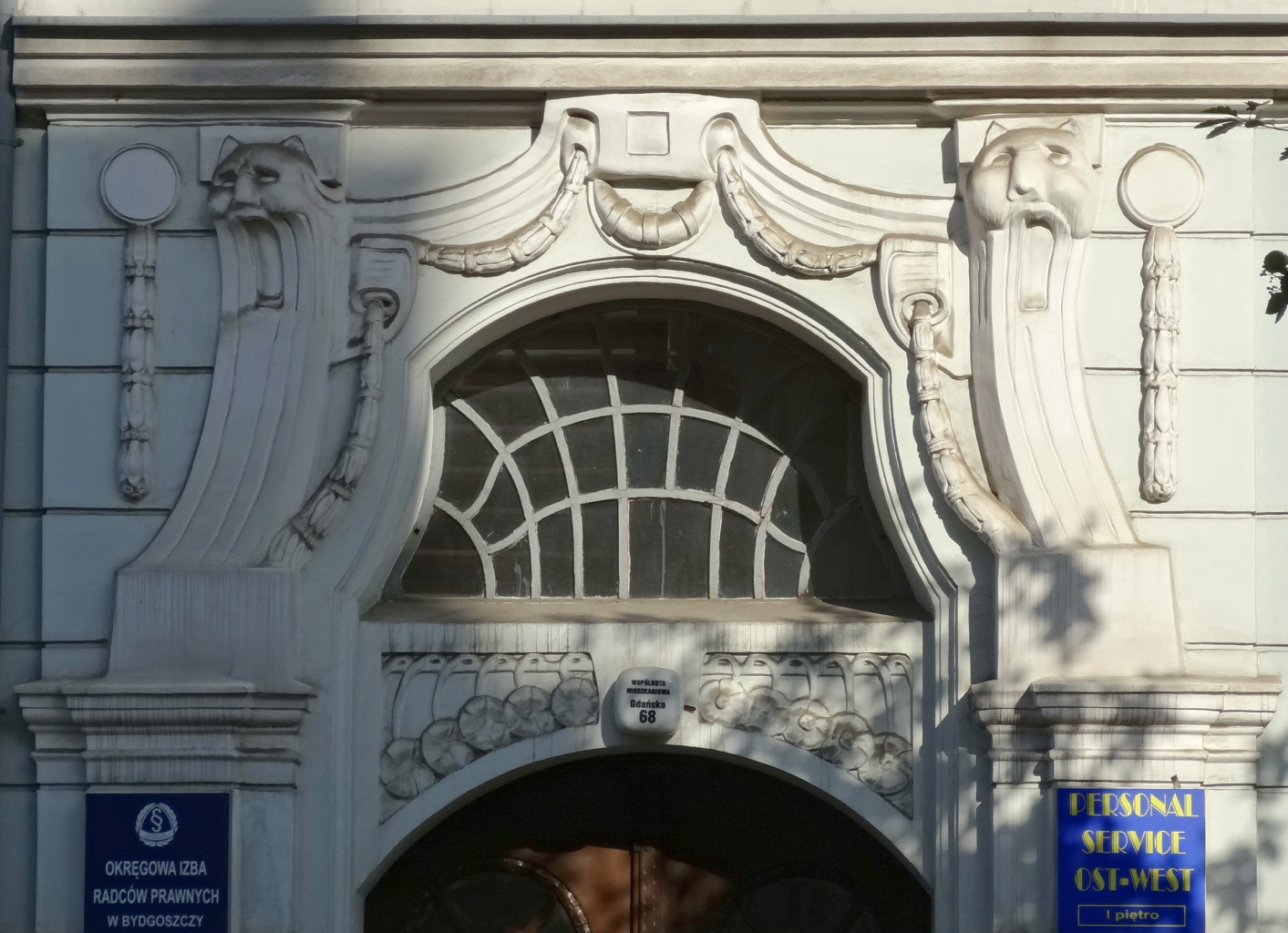 Kamienica przy ul. Gdańskiej 68 w Bydgoszczy (1904-1905)